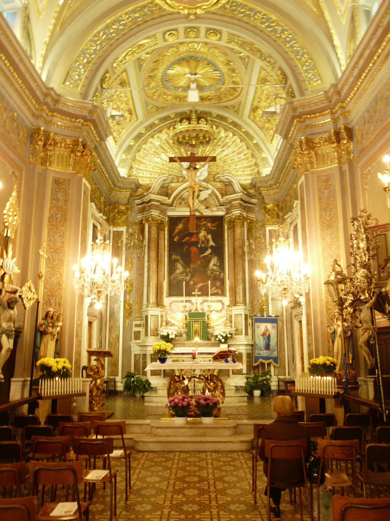 Oratorio di Nostra Signora del Rosario, Confraternita delle Cappe Turchine, Loano, Liguria, Italia.